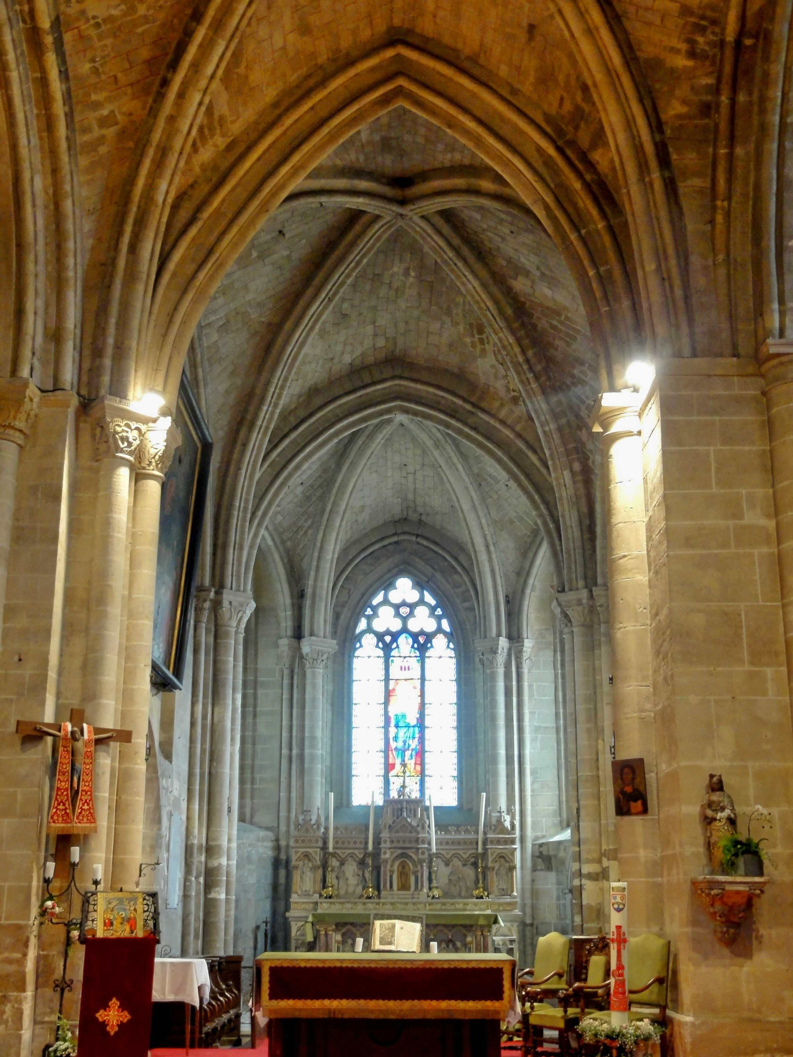 Vue dans le chœur depuis la croisée du transept.